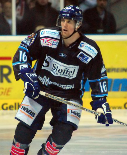 Eric Chouinard